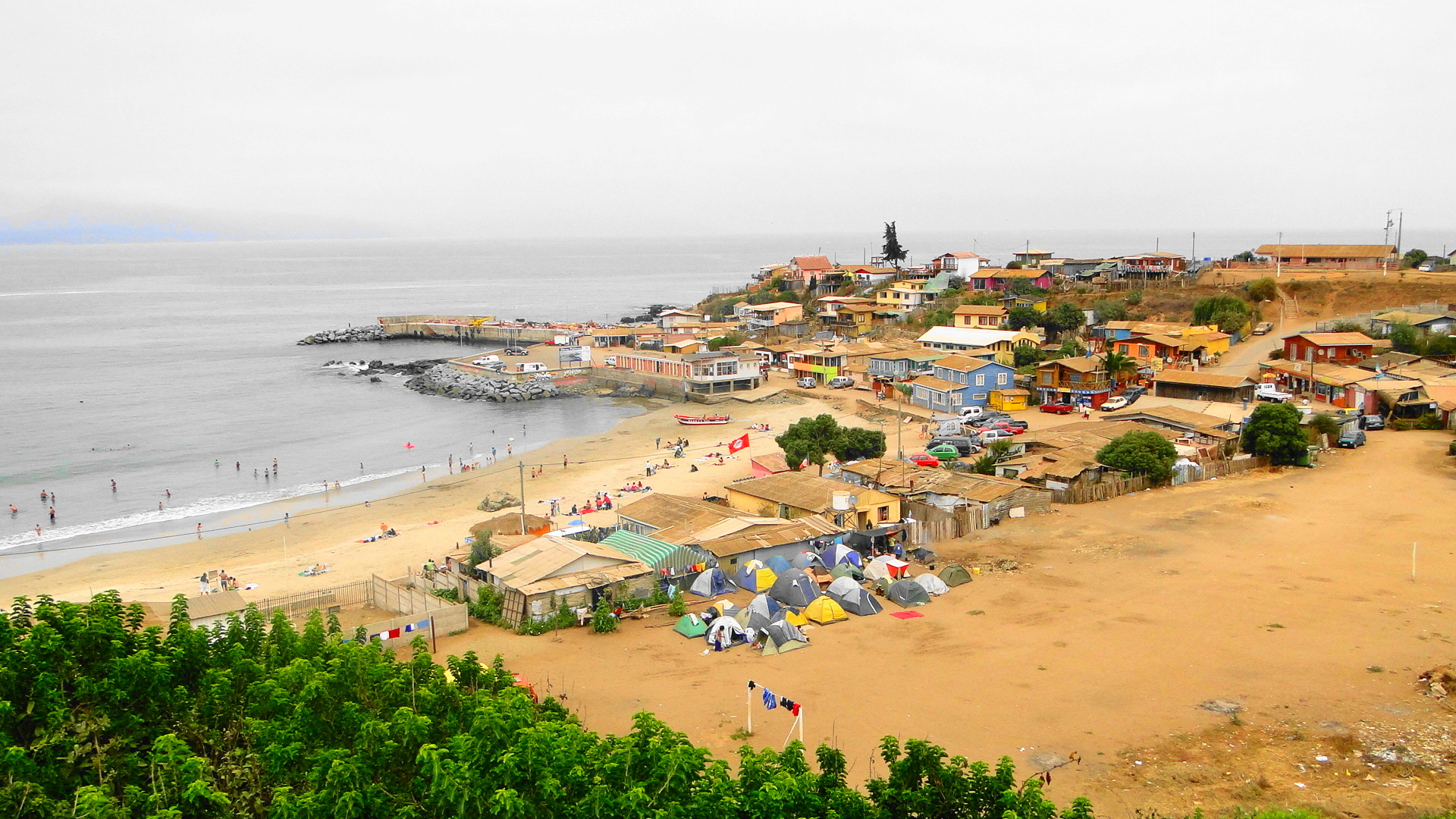 Pichicuy en colores